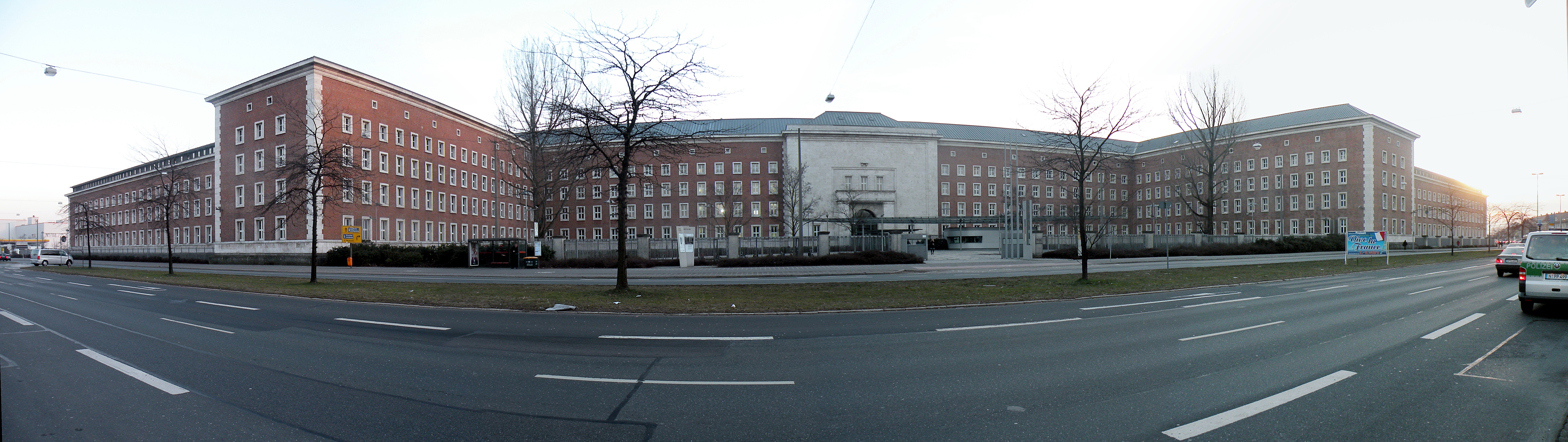 Нюрнберг._Бывшие_казармы_войск_СС